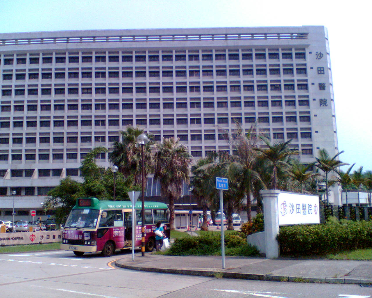 沙田醫院